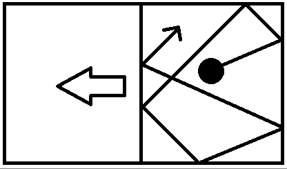 המחיצה נעה בהשפעת הלחץ של הגז שנמצא רק מצידה האחד. ניתן לנצל זאת על מנת לבצע עבודה.